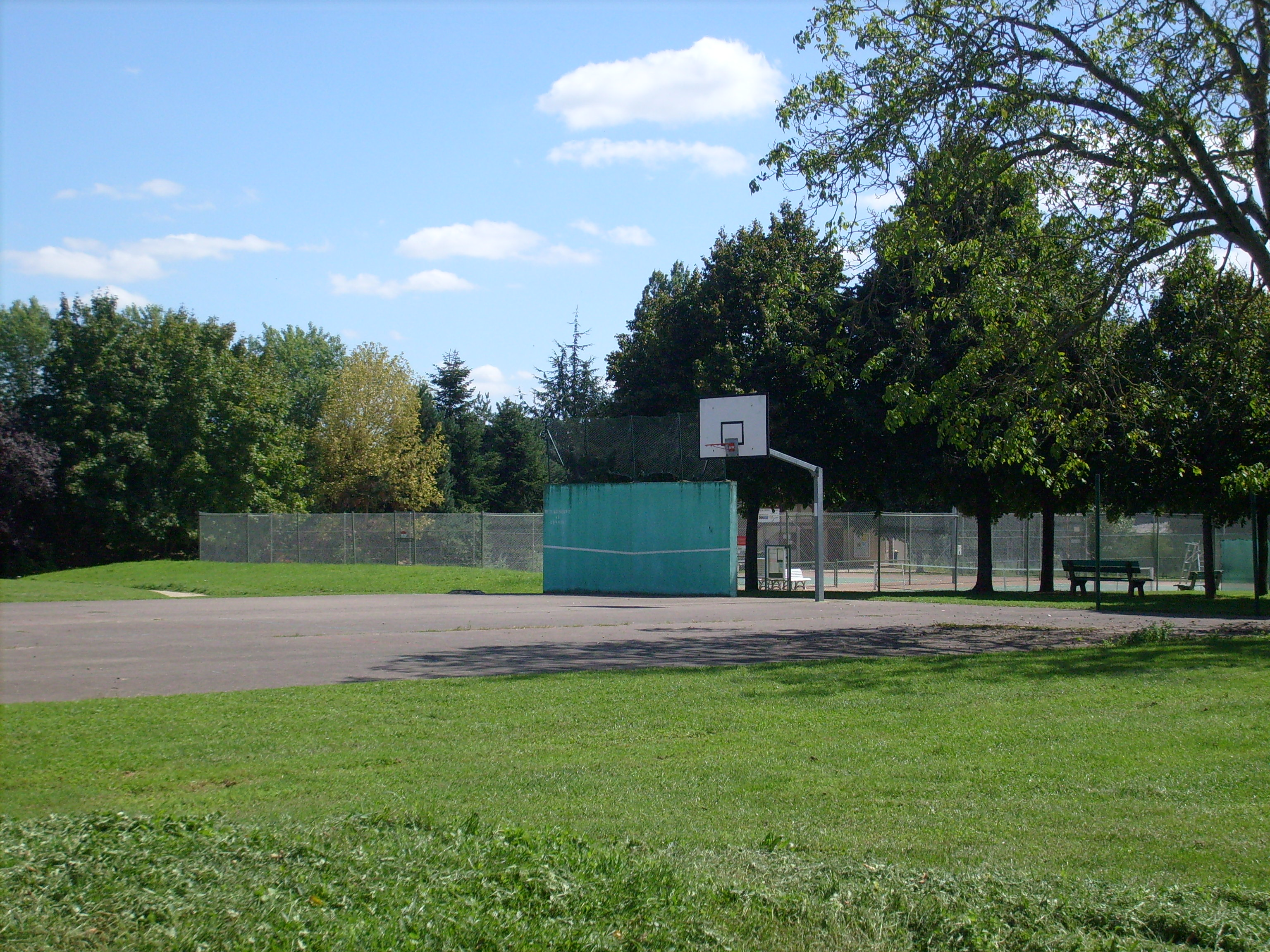 Terrain de basket outdoor et courts du TCG. Juste derrière eux le stade Norbert Chagnard du FLL Gergy Verjux